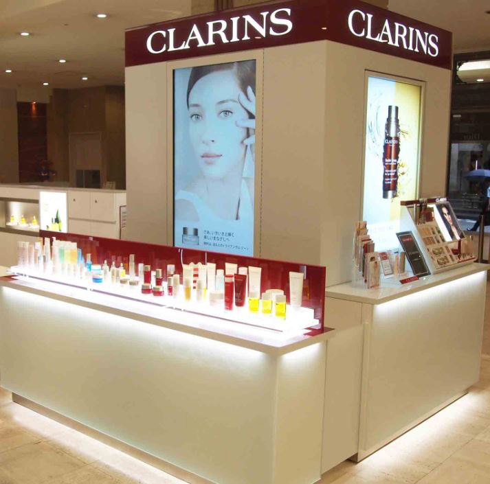 クラランス店頭の写真